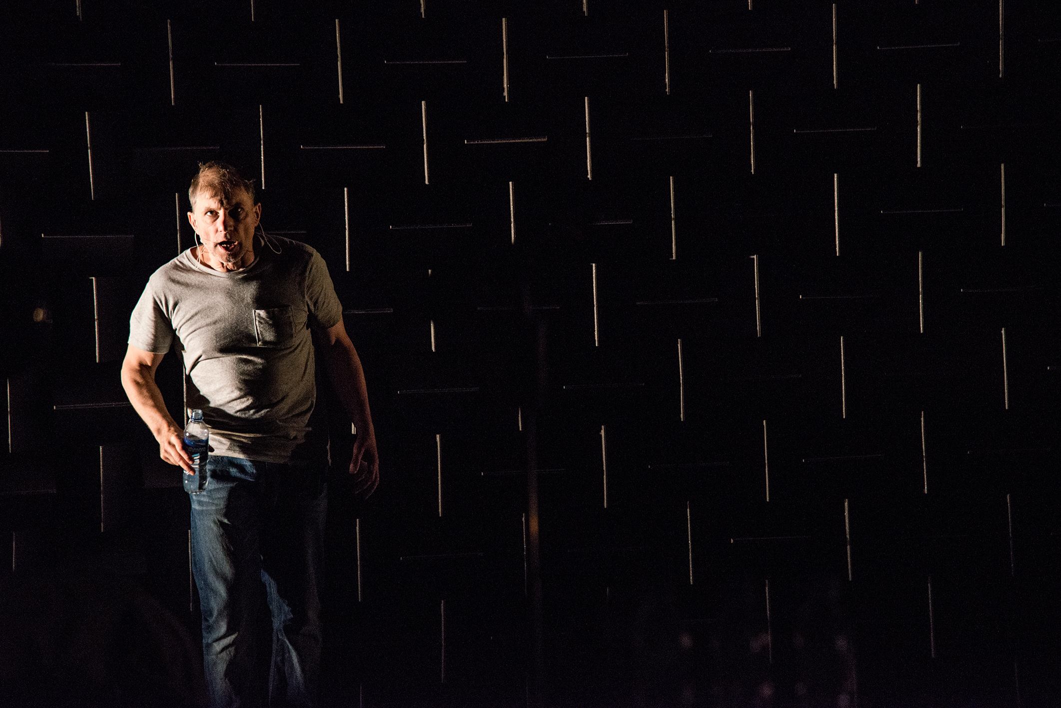 Simon McBurney in "The Encounter" (Théâtre de Complicité), World Premiere at the Edinburgh International Festival, August 2015